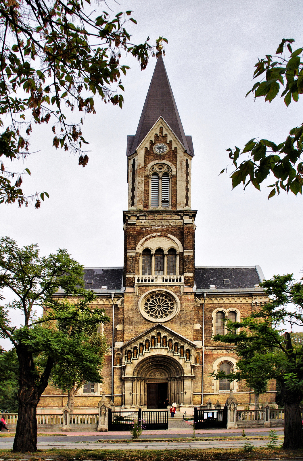 Magyarok Nagyasszonya római katolikus templom (Budapest 15, Széchenyi tér 11.) This is a photo of a monument in Hungary. Identifier: 13946